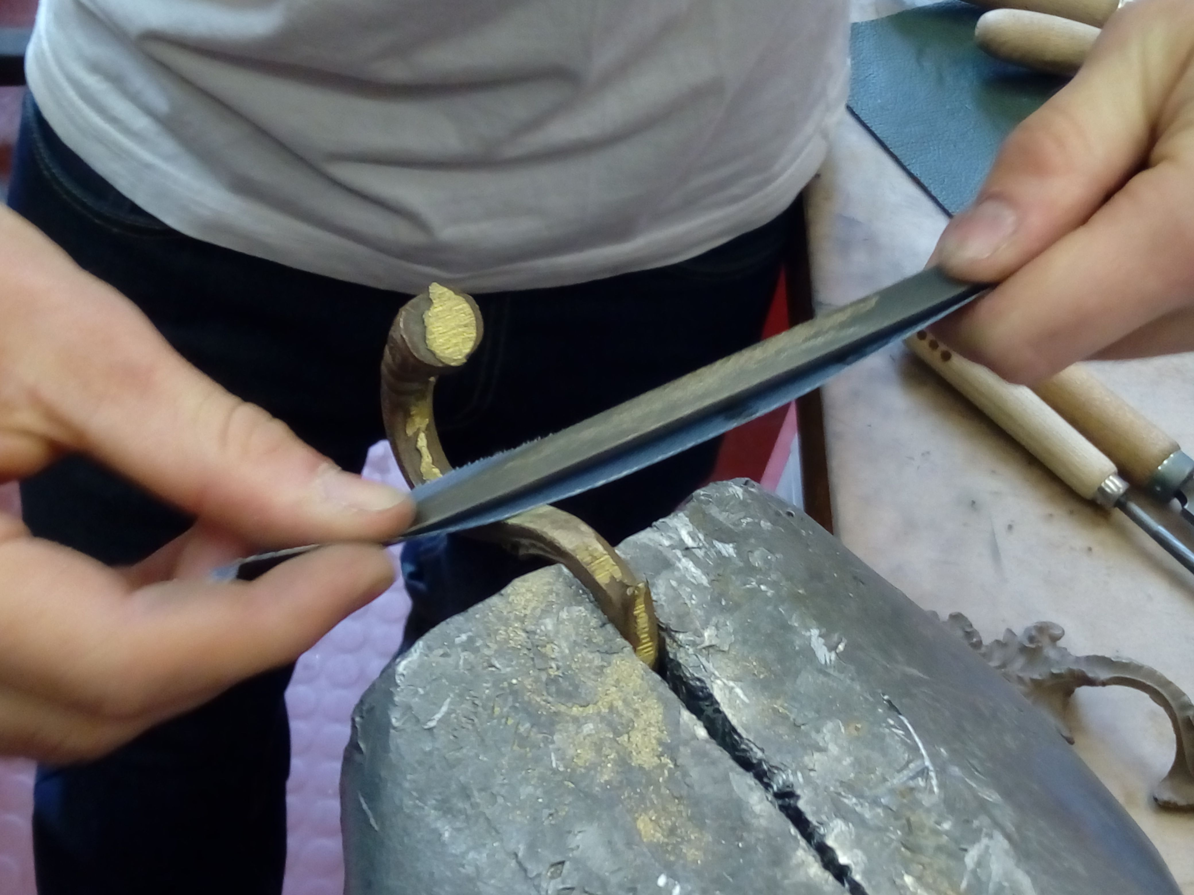 Travail d'une pièce de bronze à la toile émeri montée sur une grosse lime